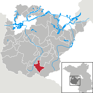 Niemegk in Brandenburg (Country) - District Potsdam-Mittelmark